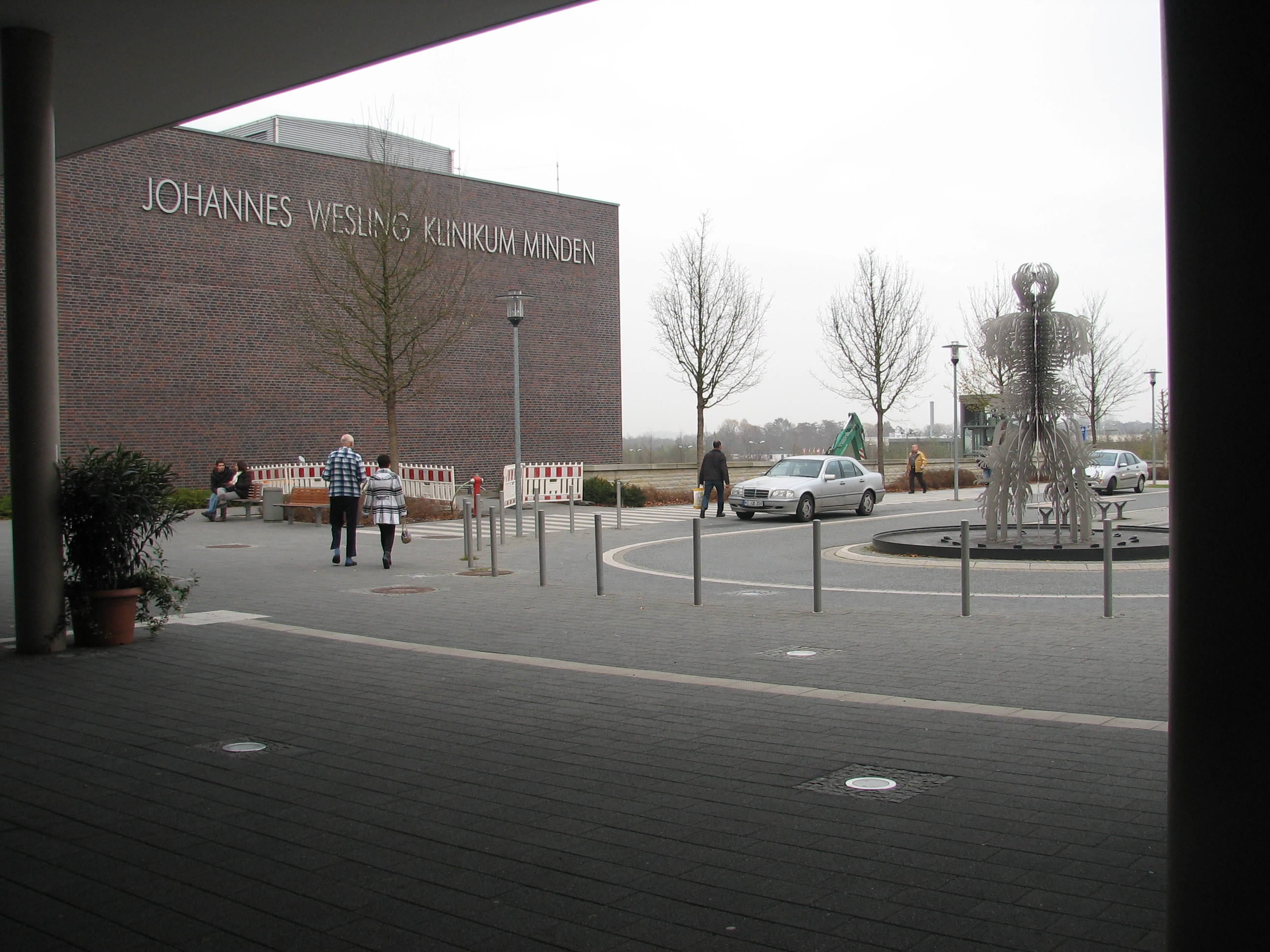 Johannes Wesling Klinikum in Minden, Eingangshalle mit Schriftzug